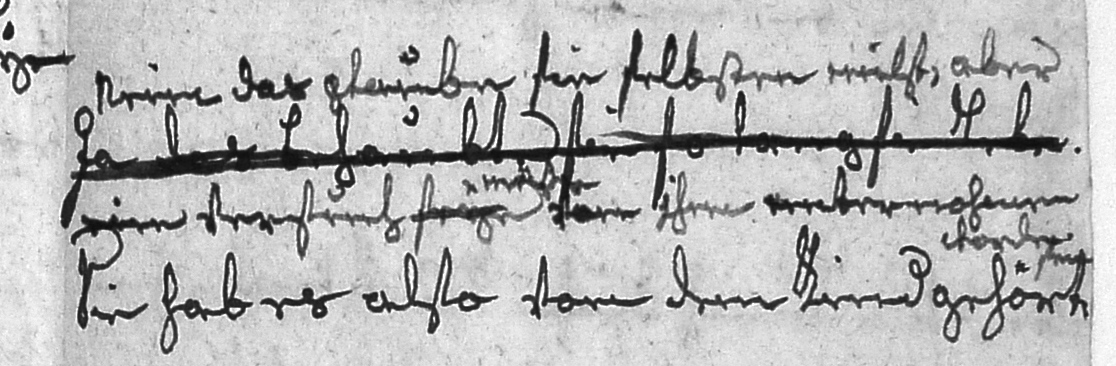 Antwort von Frau Gäschlin auf die Frage, ob der bayerische Gesandte in der Eidgenossenschaft Franz Rudolf Freiherr von Schwachheim ihre 11- oder 12-jährige Tochter Anna Katharina vergewaltigt habe: »Ja, das behaubte sie, so lang sie lebe.« Im Vernehmungsprotokoll durchgestrichen und ersetzt durch: »Nein, das glaube sie selbsten nicht, aber ein Versuch müße von ihme unternohmen worden seyn. Sie hab es also von dem Kind gehört.«